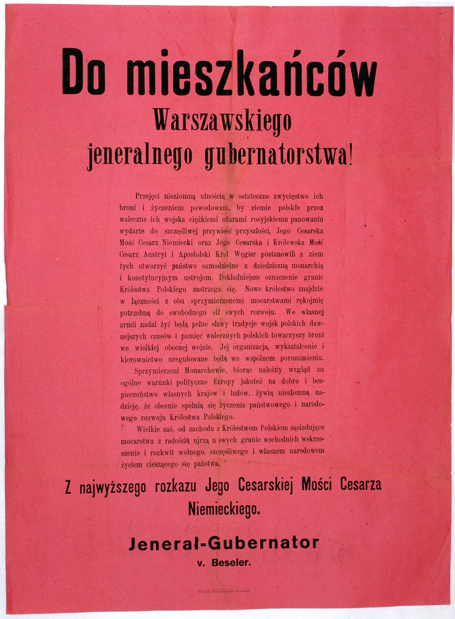 Akt 5 listopada